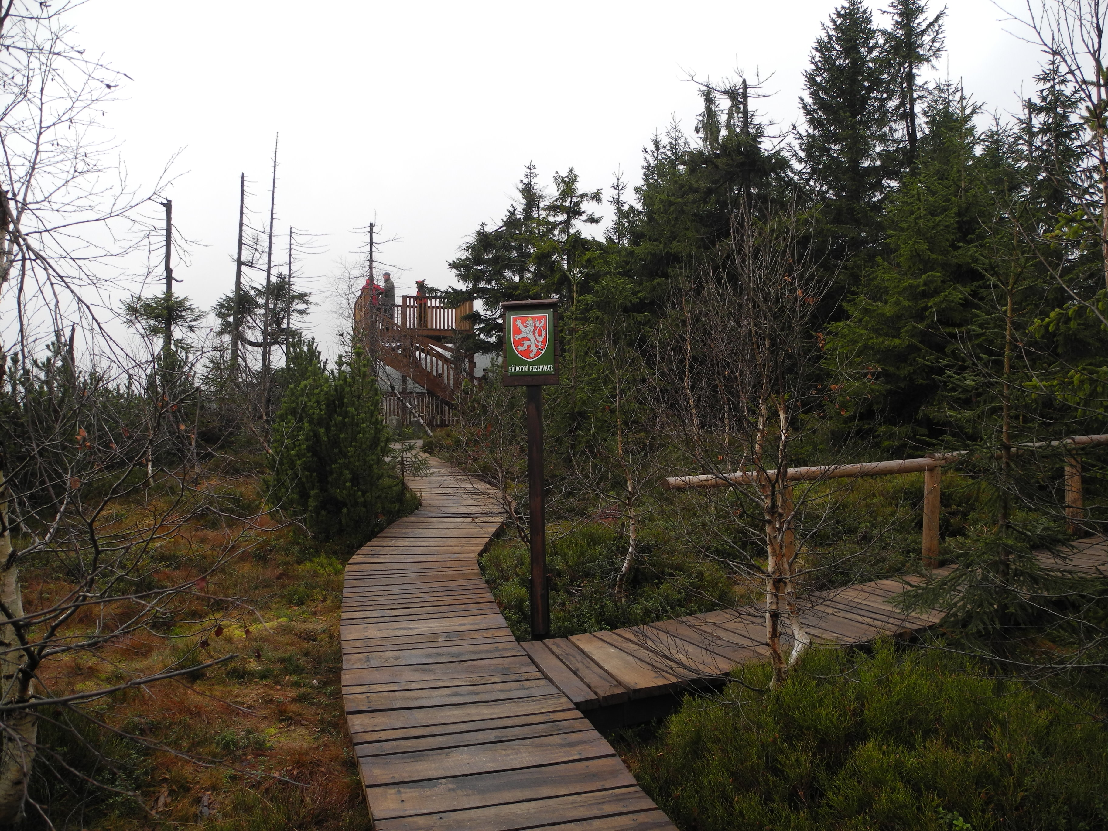 Povalový chodník umožňující přístup turistů na PR